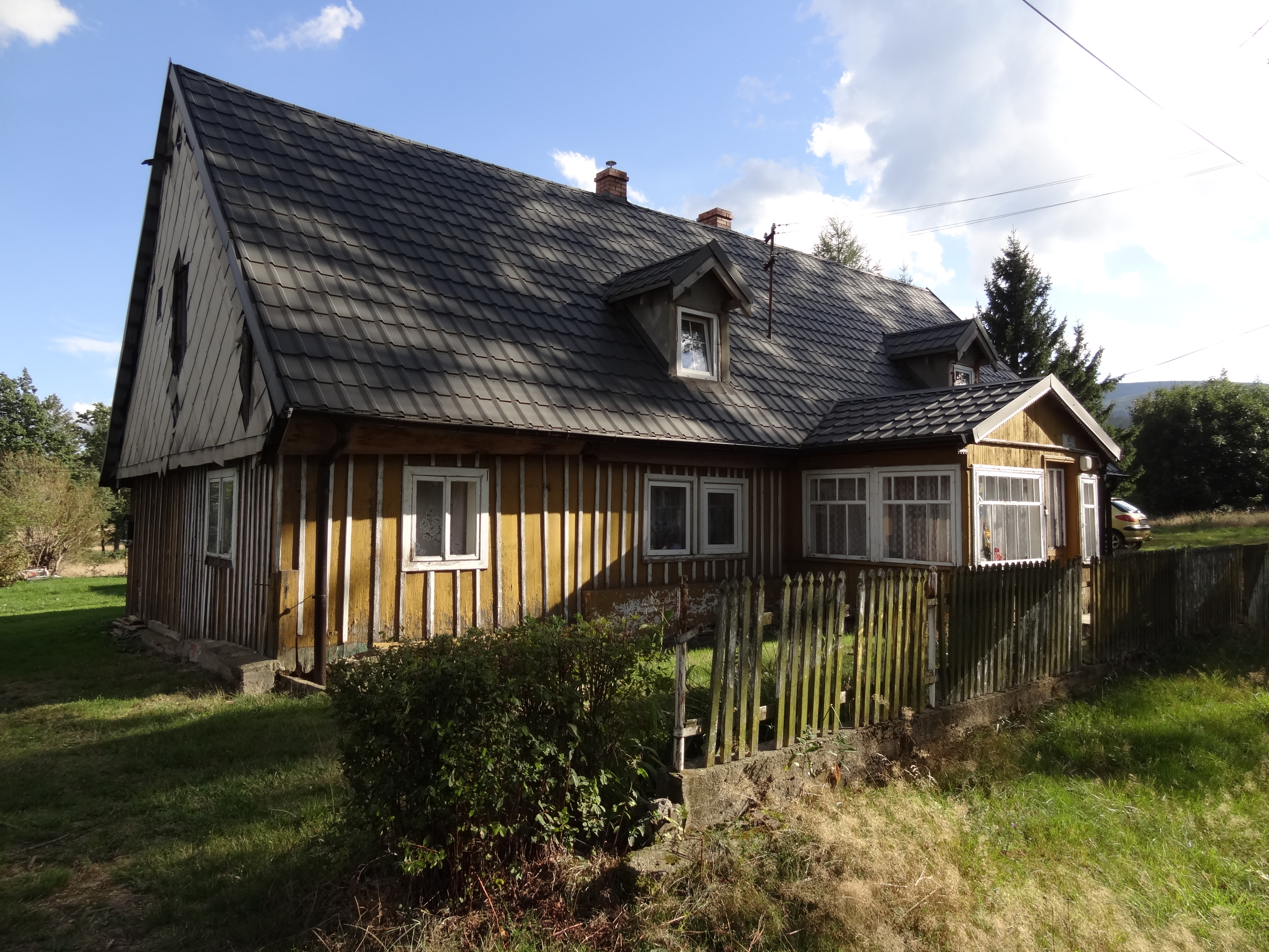 Ulicko (Strassberg n. Bergstrass), část Czerniawy-Zdrój v Jizerských horách - lidové chalupy v ul. Długa